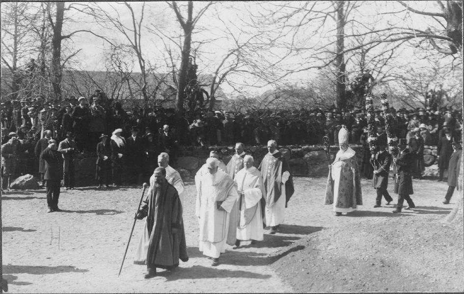 Kyrkogården, från återinvigningen av klosterkyrkan 10/5 1923 efter restaureringen.